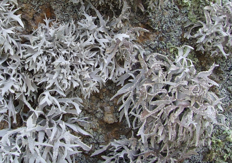 Roccella fuciformis (Beg al Lochou, Goulien, Finistère, France)